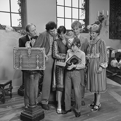 Cor van Rijn, Joost Prinsen, Marijke Merckens, Czeslaw de Wijs, Peter Bos en Kitty Janssen in de Nederlandse televisieserie De Zevensprong in 1981